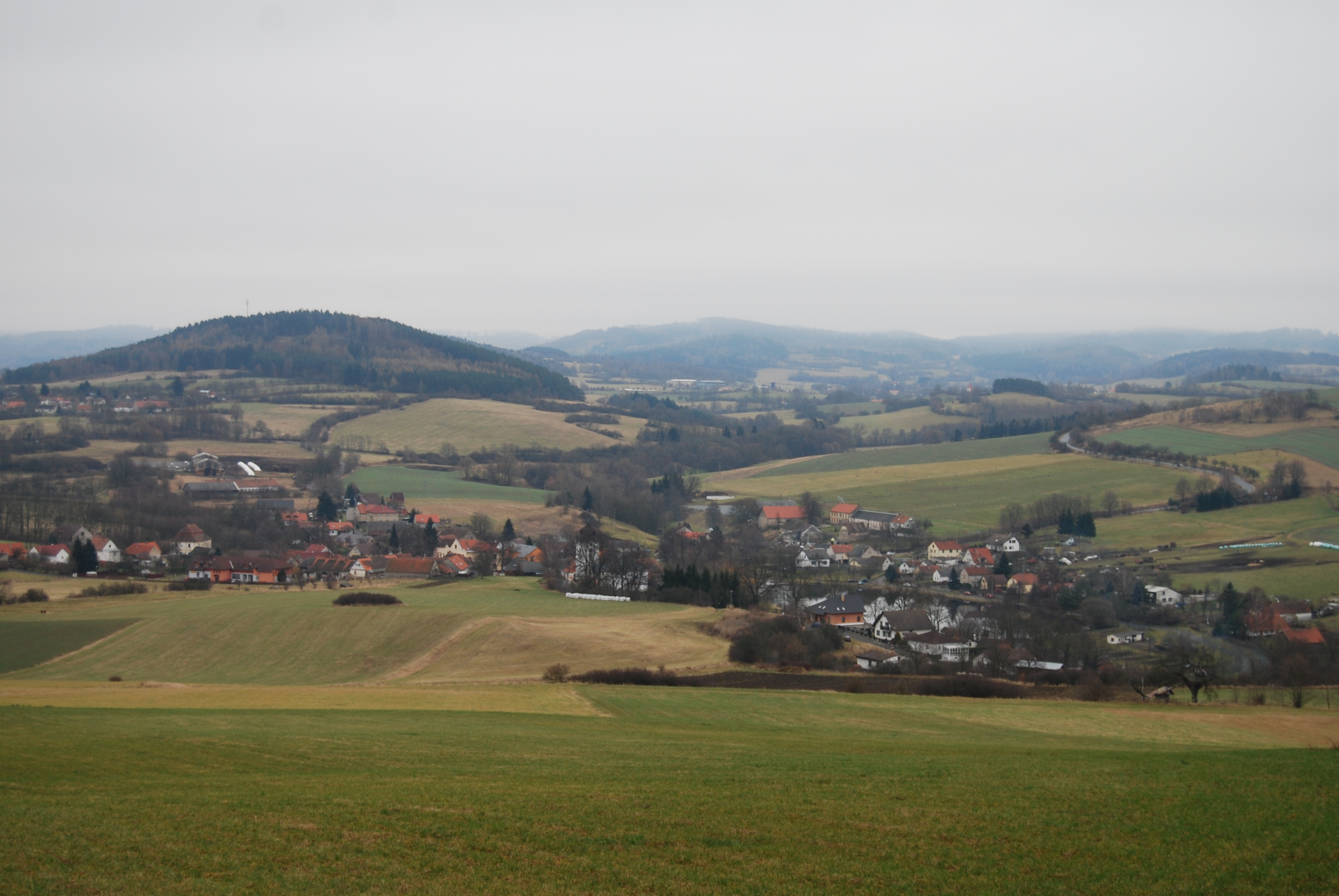 Pohled na obec z hory Radešín. Počepice. Okres Příbram. Česká republika.